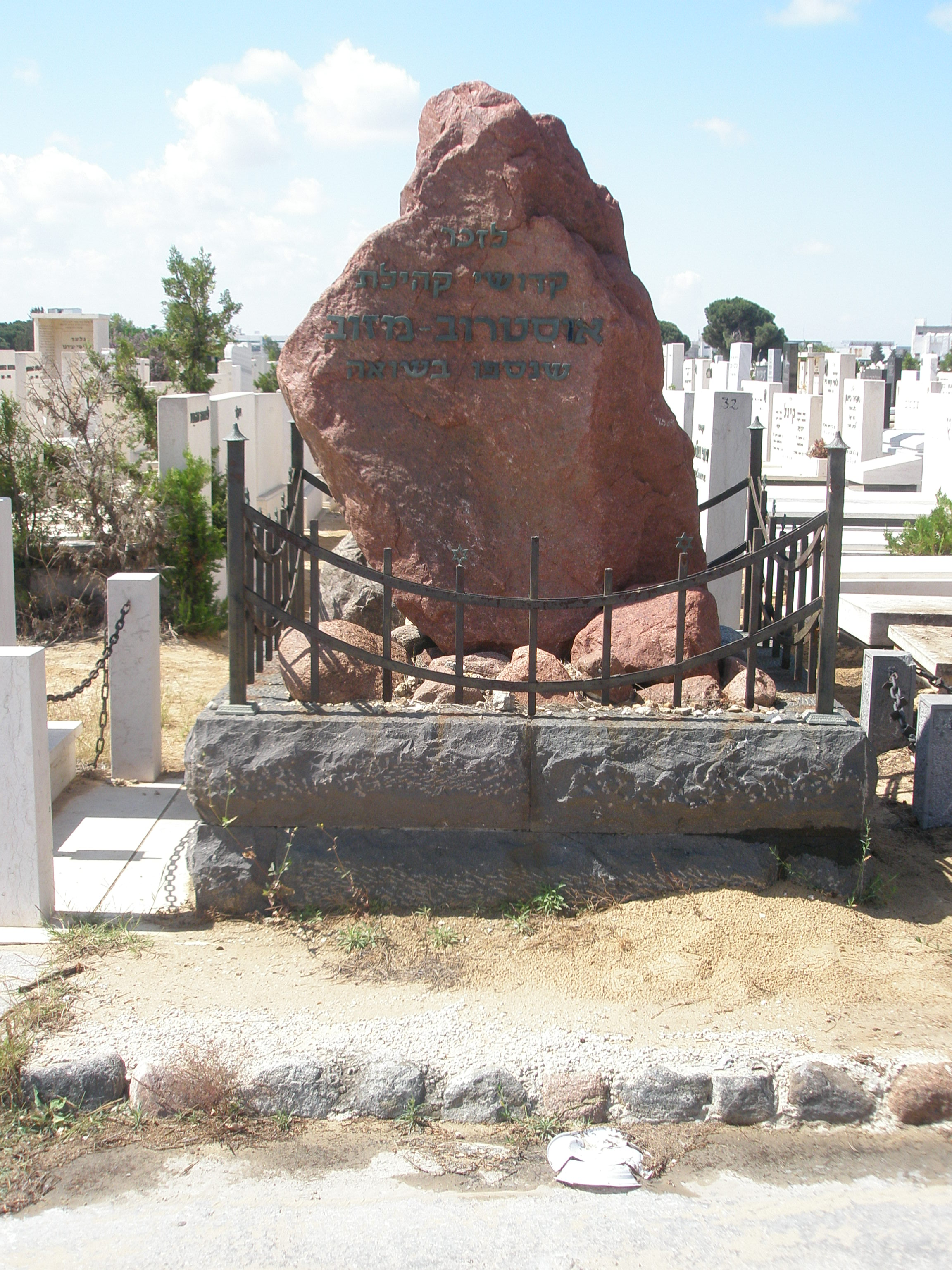 Ostrów Mazowiecka memorial at Holon Cemetery